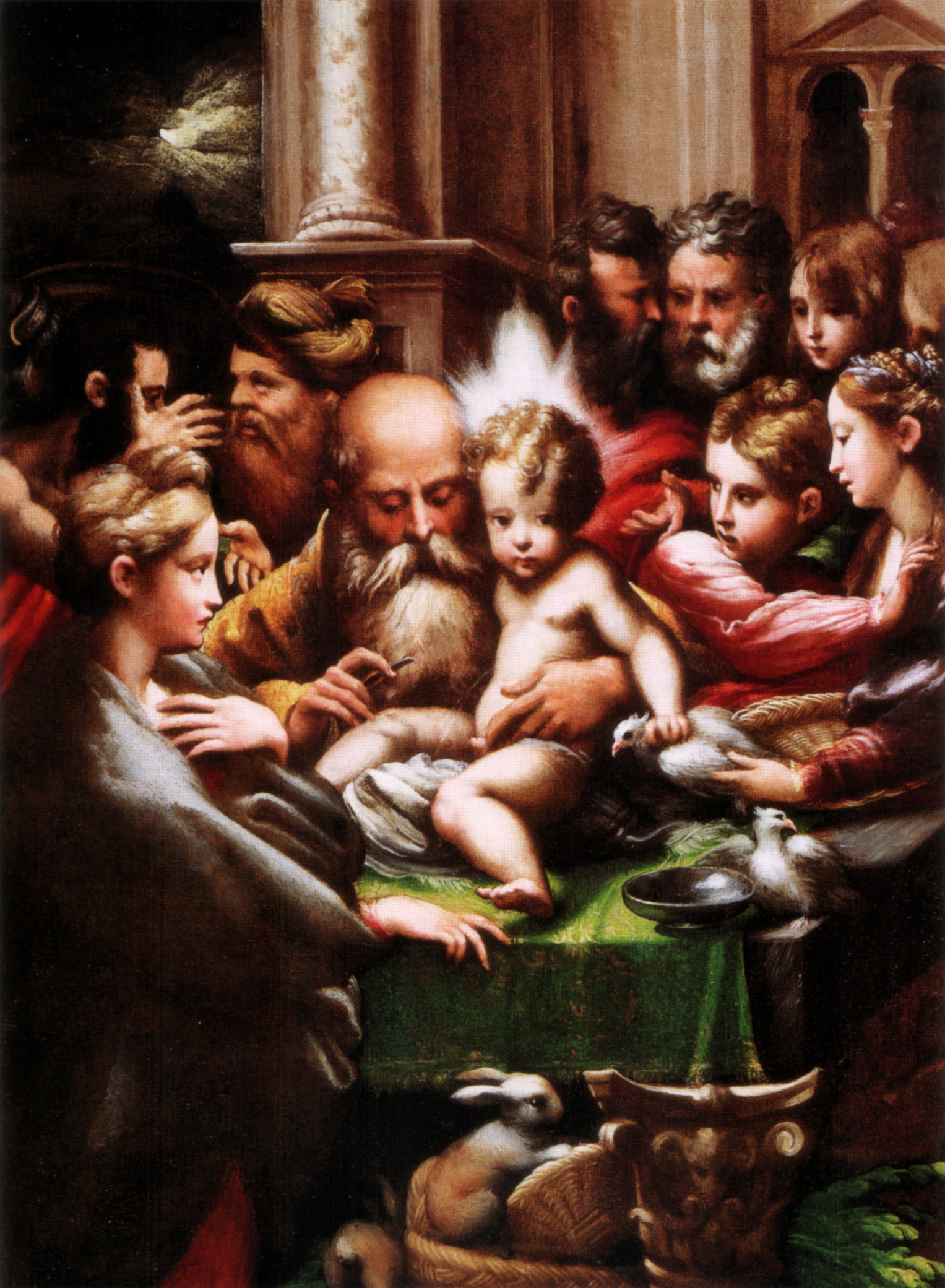 Circoncisione di Gesùlabel QS:Lit,"Circoncisione di Gesù"